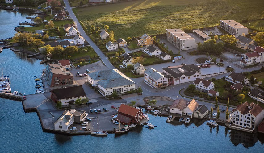 Vikevåg